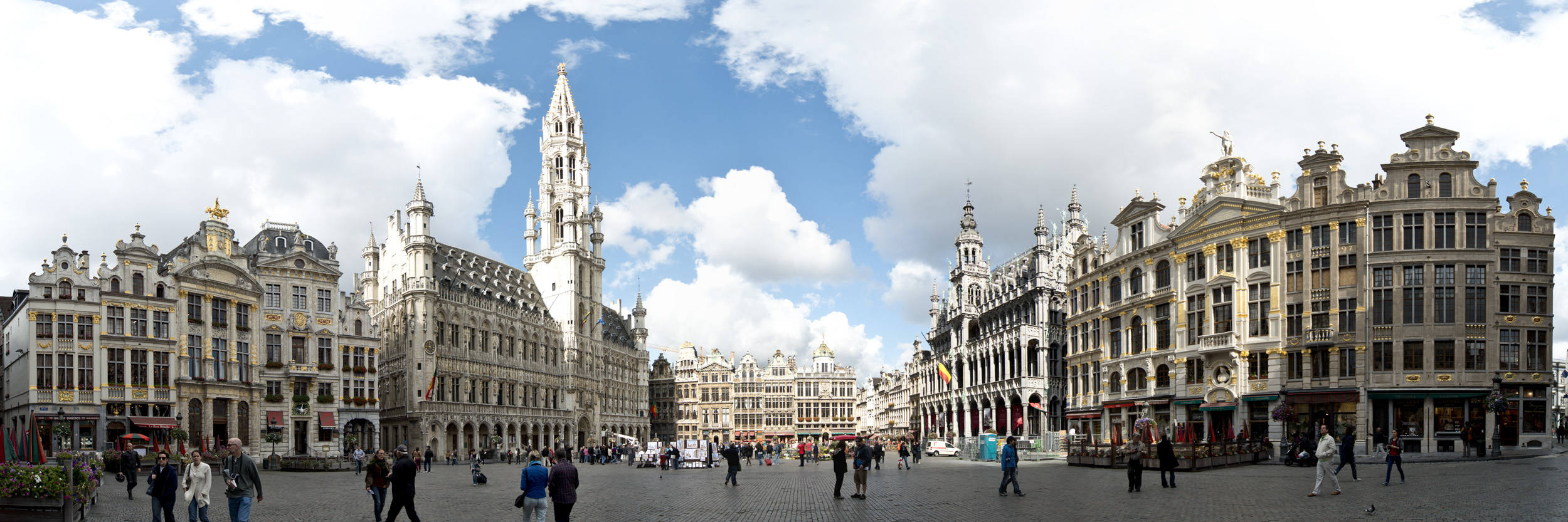 Grote Markt